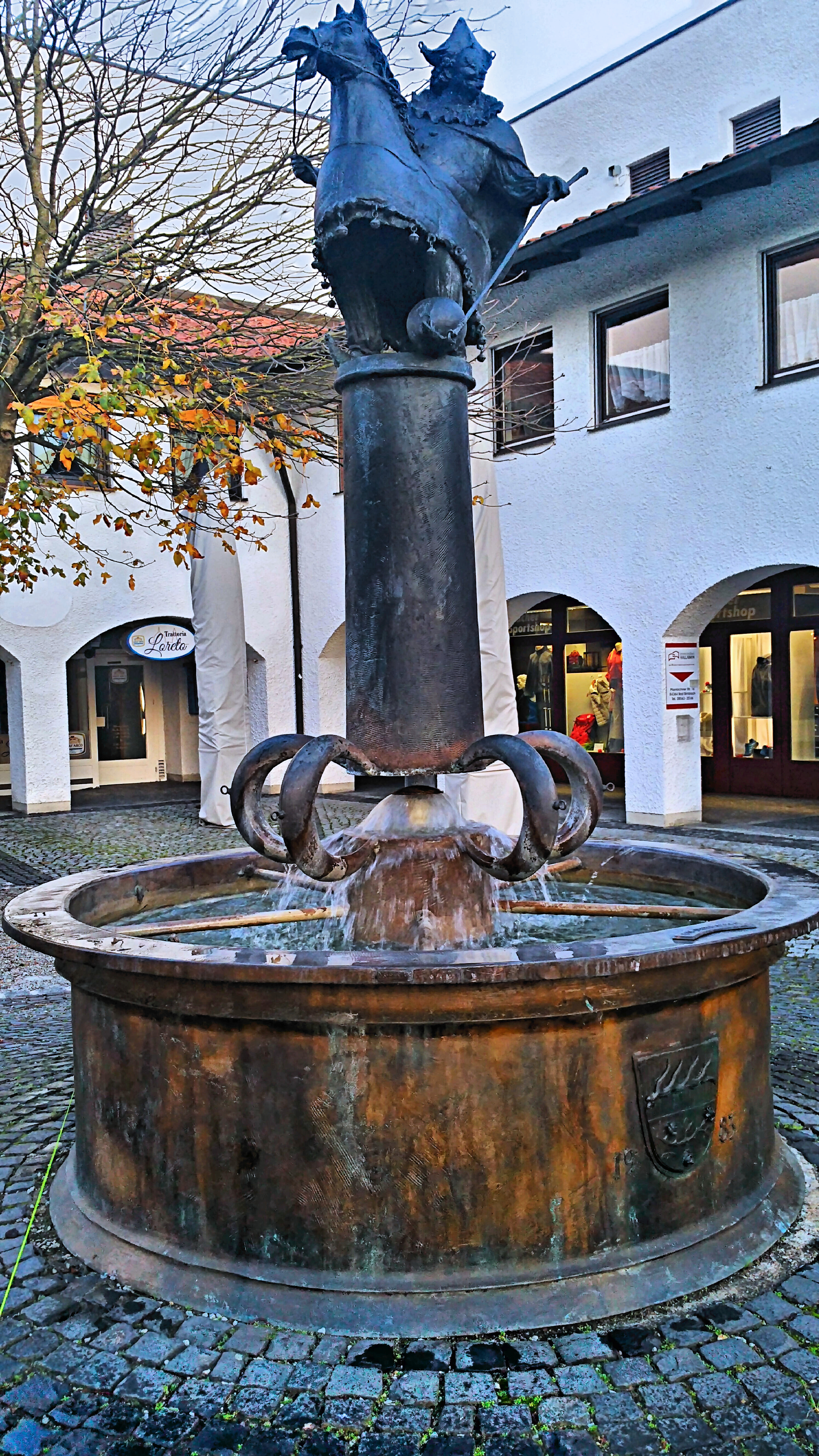 Deutschland, Bayern, Regierungsbezirk Niederbayern, Landkreis Rottal-Ilm, Bad Birnbach, Bräunlbrunnen am Neuen Marktplatz, 1982 gestaltet vom Bildhauer Josef Michael Neustifter